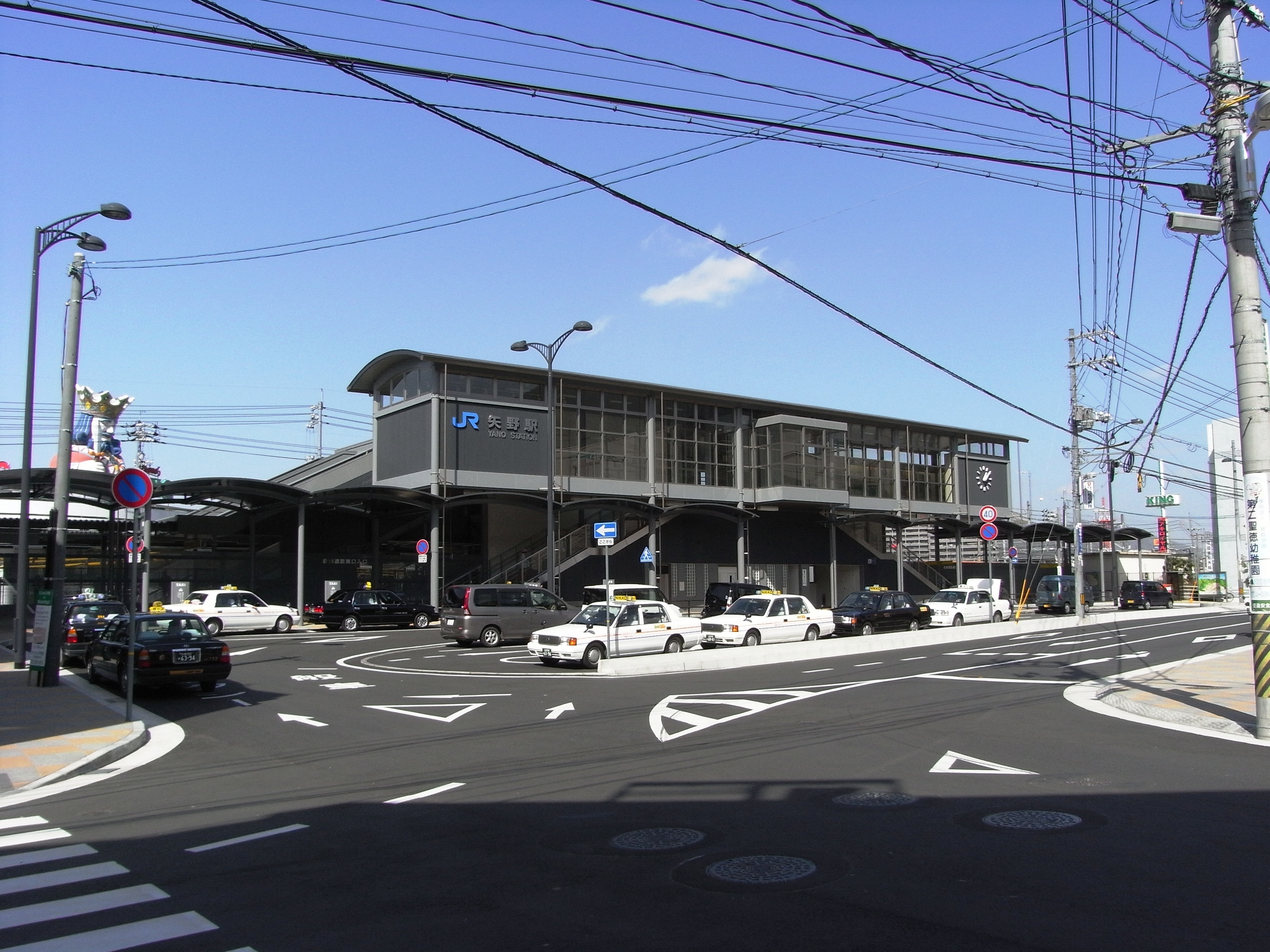 Yano Station(矢野駅)